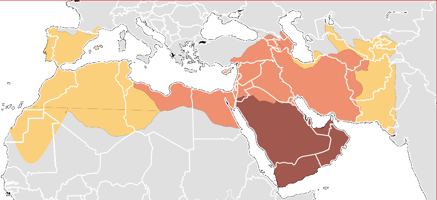 فتوحات الدولة الأموية